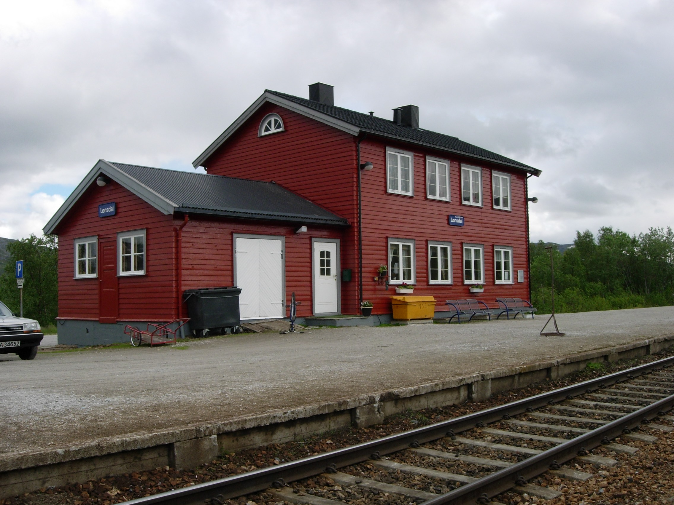 Lønsdal stasjon, on Nordlandsbanen, Norway